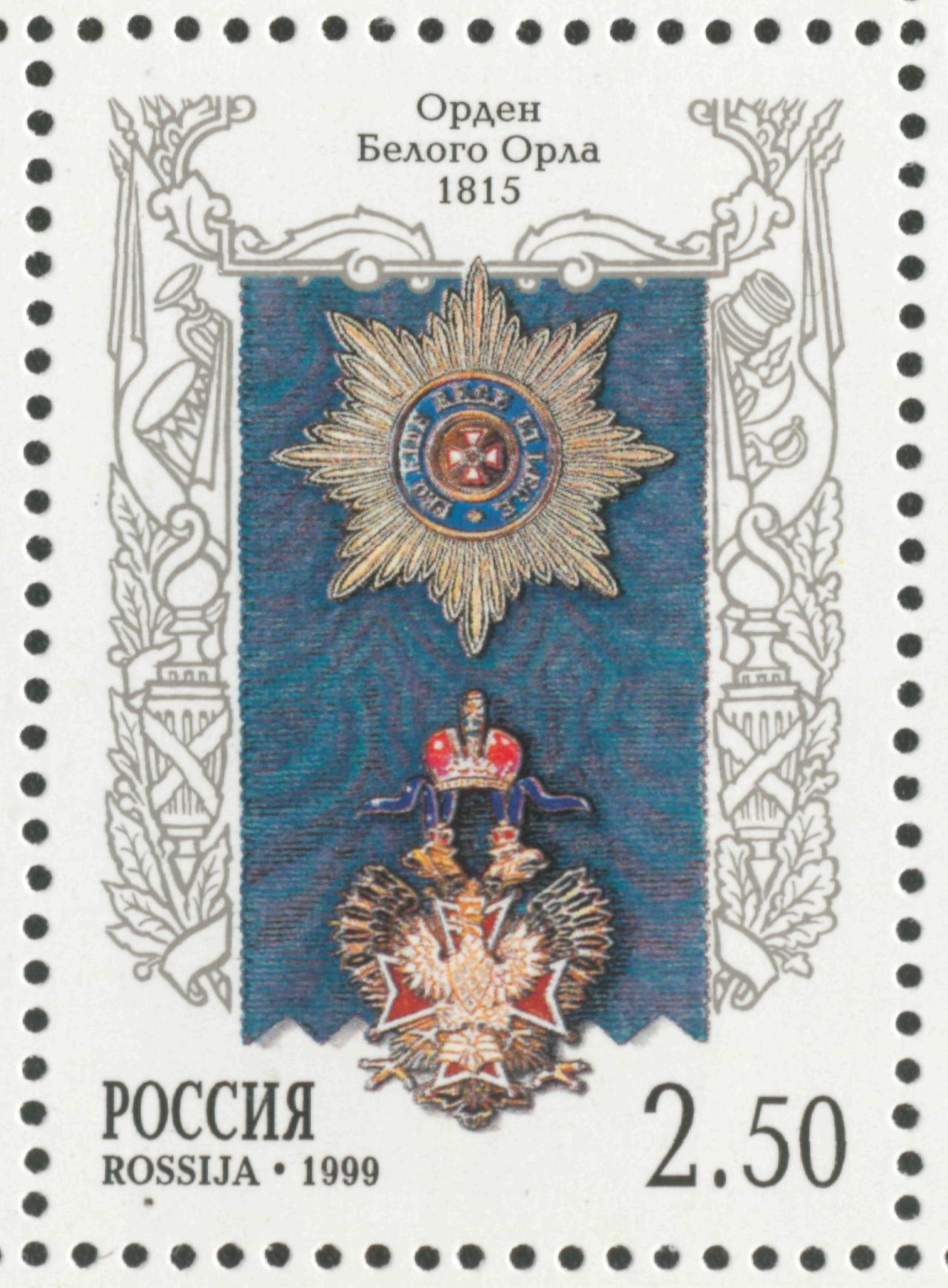 Ордена Российской Империи. Орден Белого Орла. Из малого марочного листа России из пяти марок 1999 года.